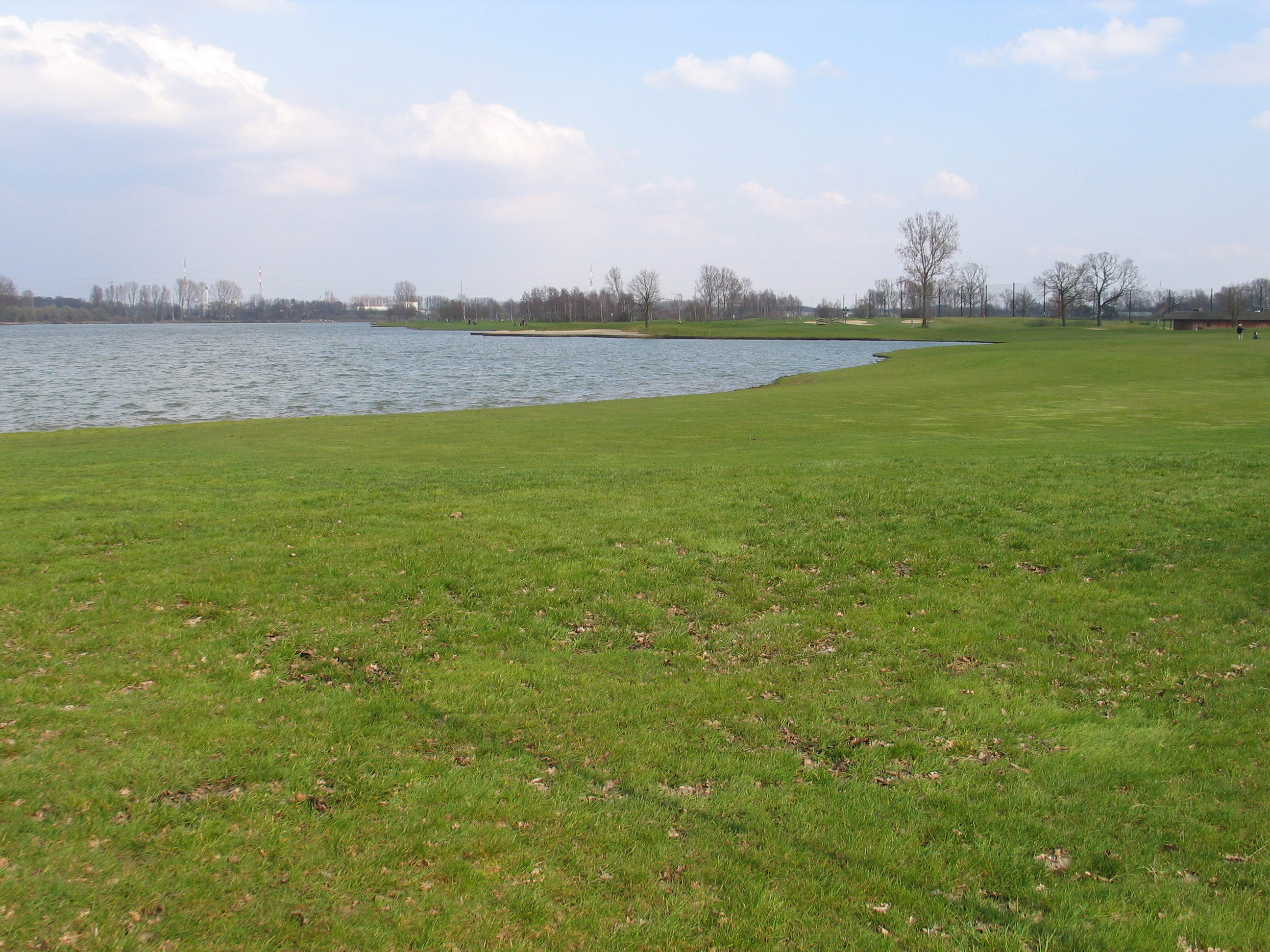 Paalse plas - recreatiegebied in de deelgemeente Paal (België) - eigen werk onder GFDL en cc-by-sa